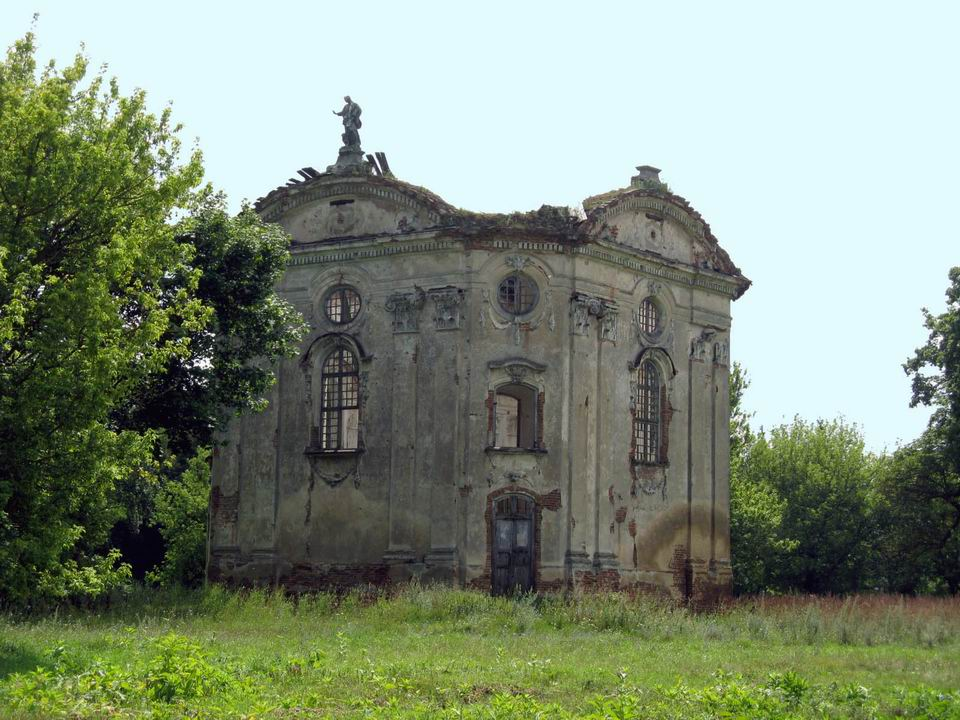 Беларуская (тарашкевіца): Воўчын